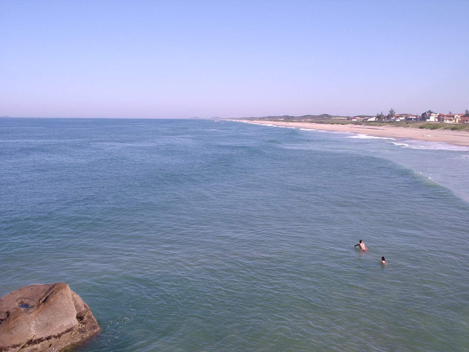 Esta imagem mostra, do ponto norte, o sul da praia grande. Localizada no município de São Francisco do Sul, do estado de Santa Catarina, Brasil.